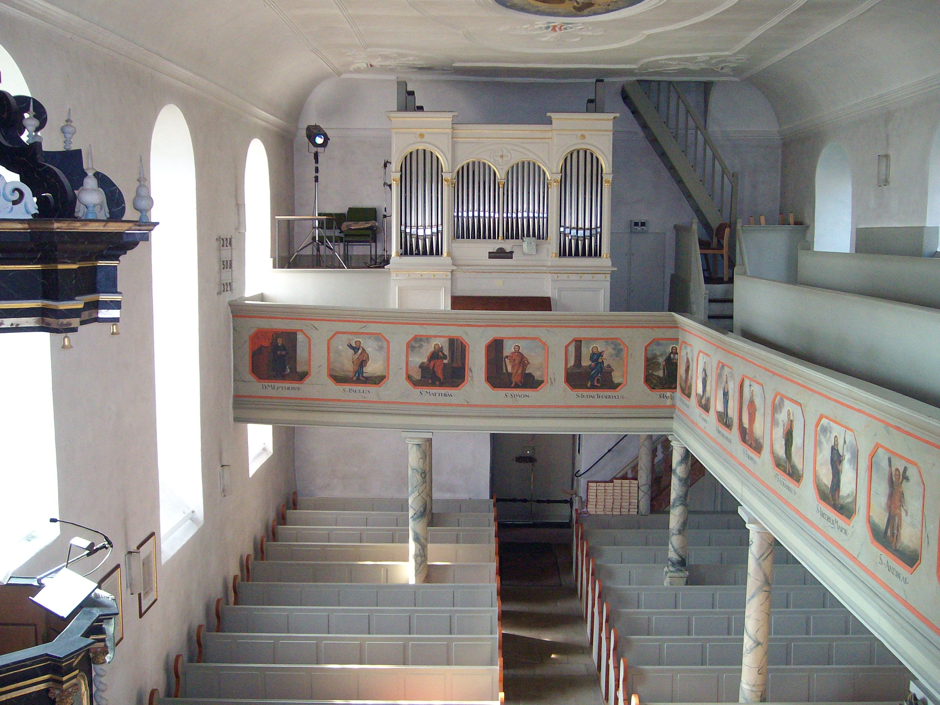 Innenraum der Ev. Kirche Niederkleen